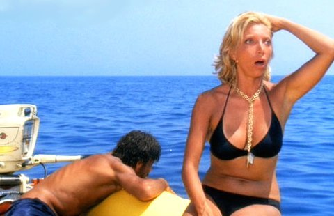 screenshot from Italian film Travolti da un insolito destino nell'azzurro mare d'agosto (1974)